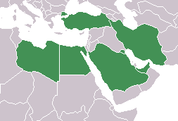 Карта стран-участниц Исламского банка развития